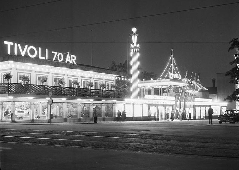 Tivoli (Gröna Lund) firar 70 år. Hörnet Allmänna gränd / Djurgårdsvägen